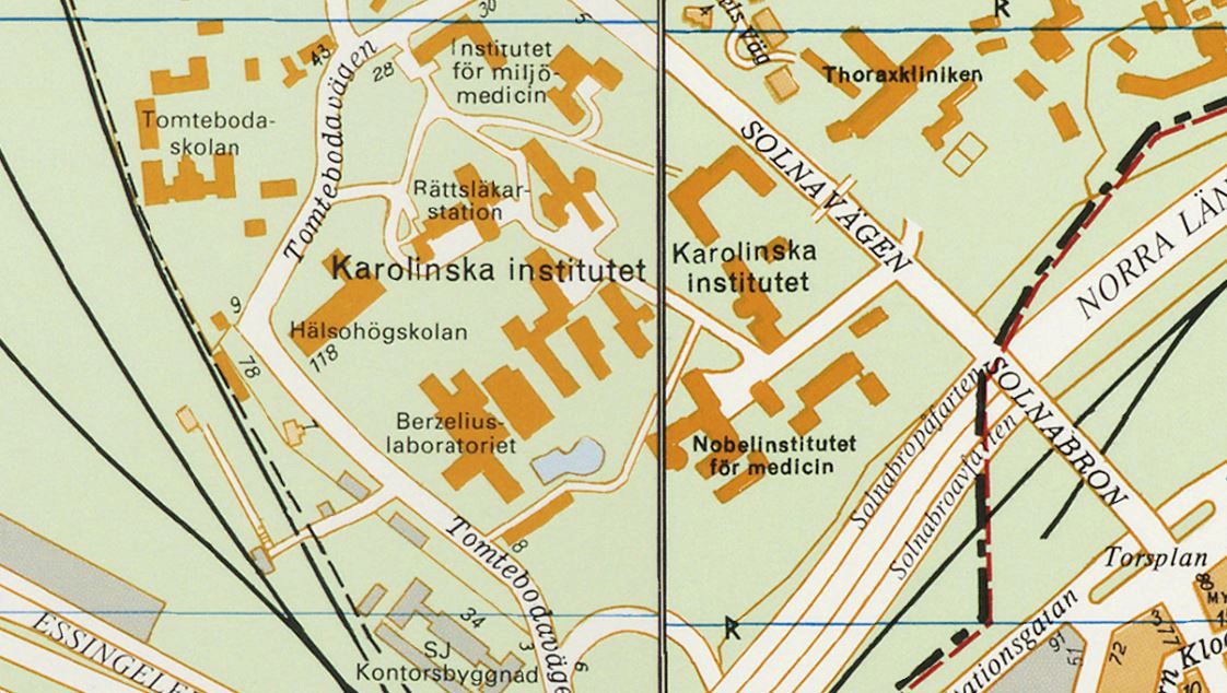 Området för dagens "Campus Solna" (när Karolinska institutet fanns här)